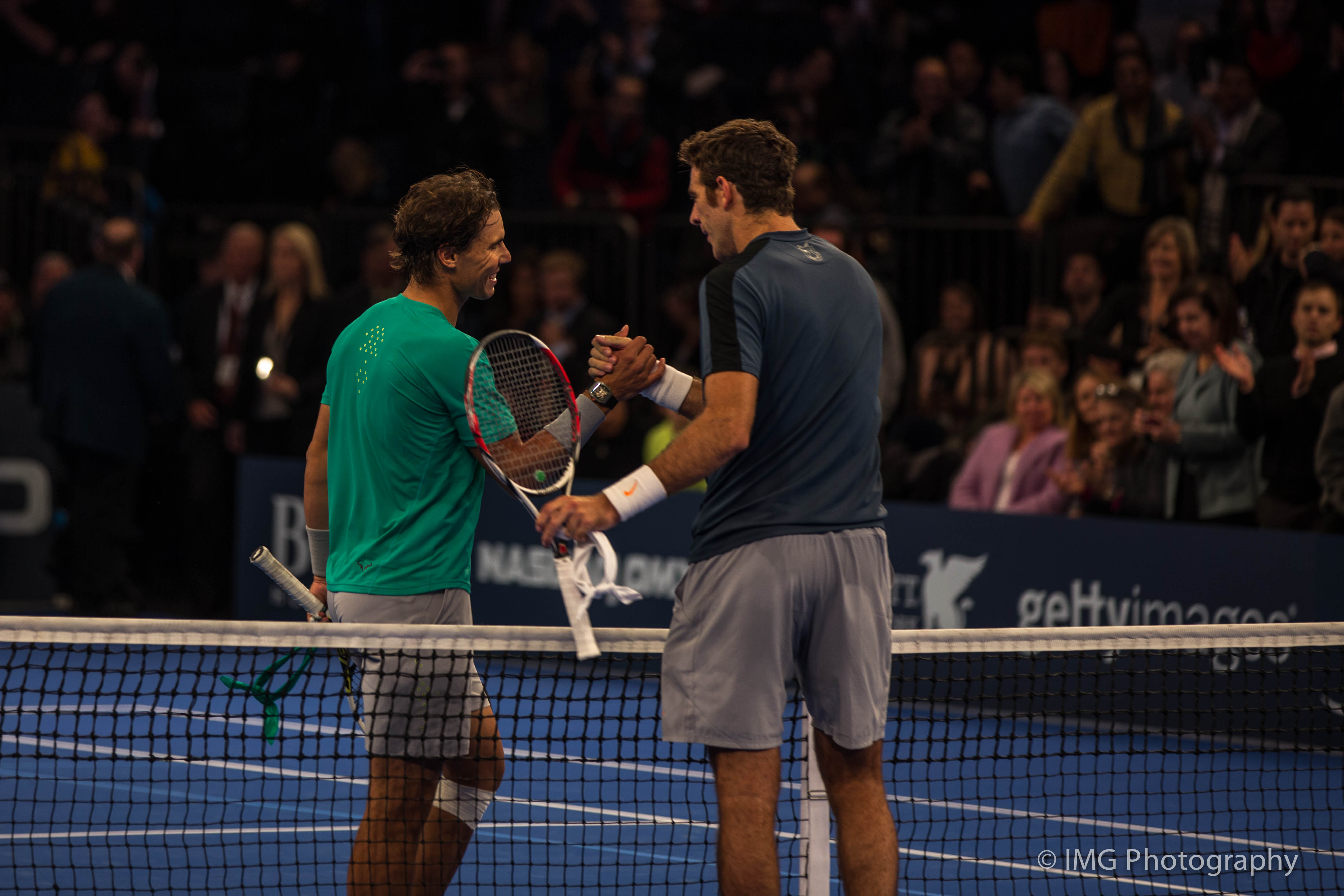 2013 BNP Paribas Showdown - Rafael Nadal vs Juan Martín del Potro